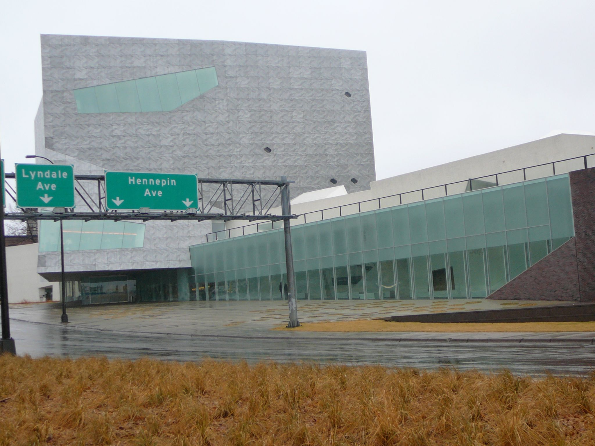 Walker Art Center, Minneapolis, Minnesota